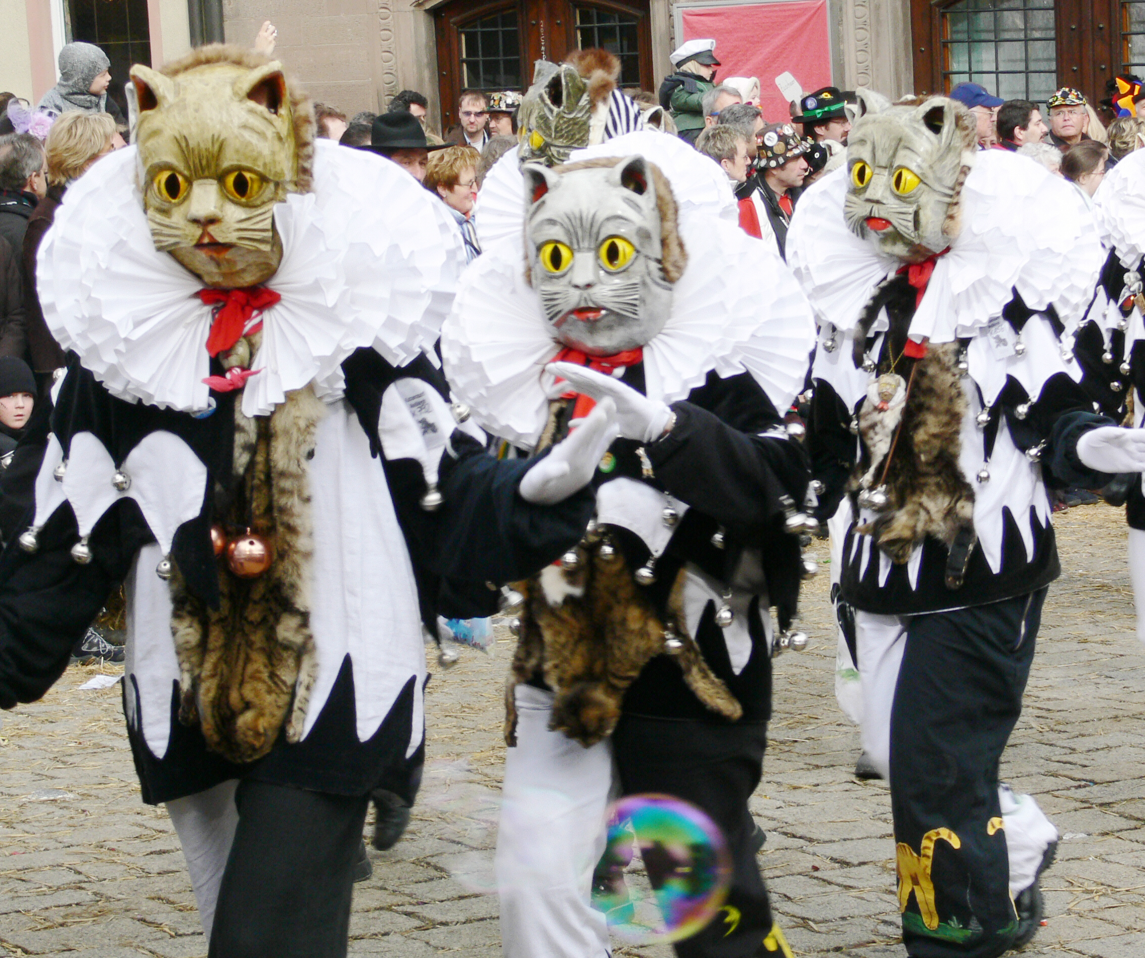 Katzenzunft Meßkirch, Figur: Katze Veranstaltung: Narrensprung beim Narrentreffen Meßkirch 2006